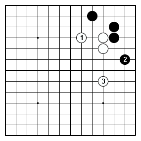 Go-Spiel: Joseki